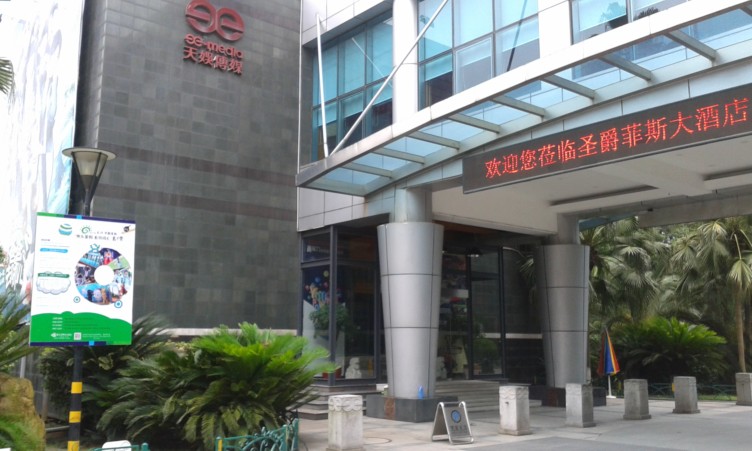 天娛傳媒總部位於金鷹影視文化城